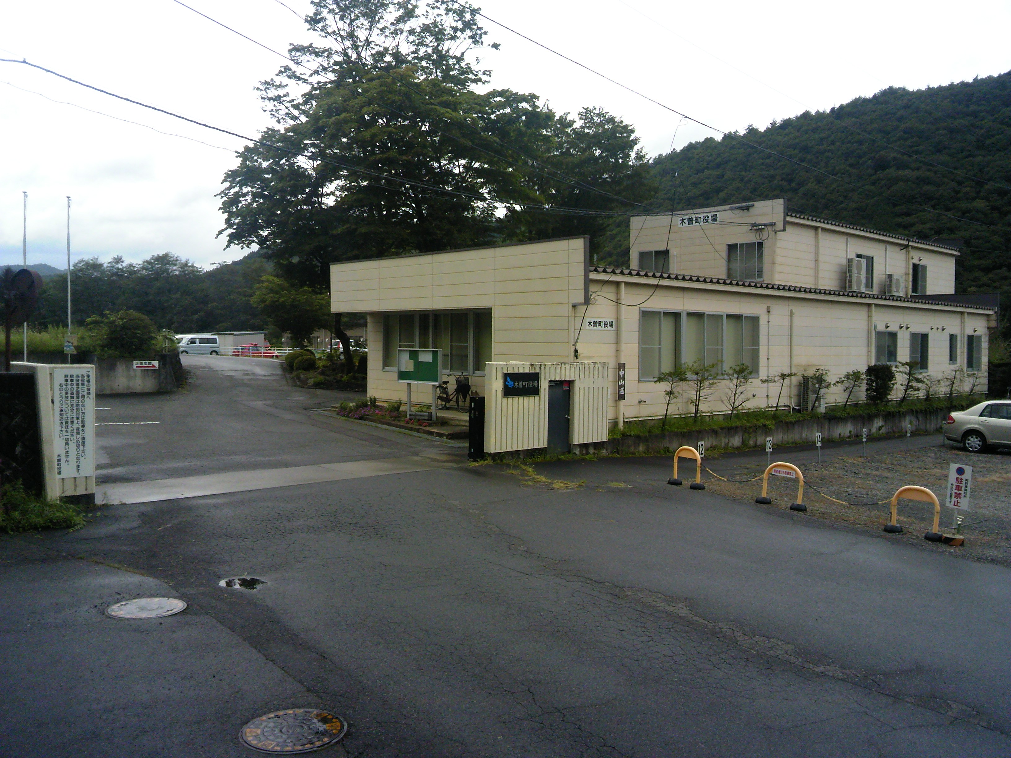 長野県木曽町役場